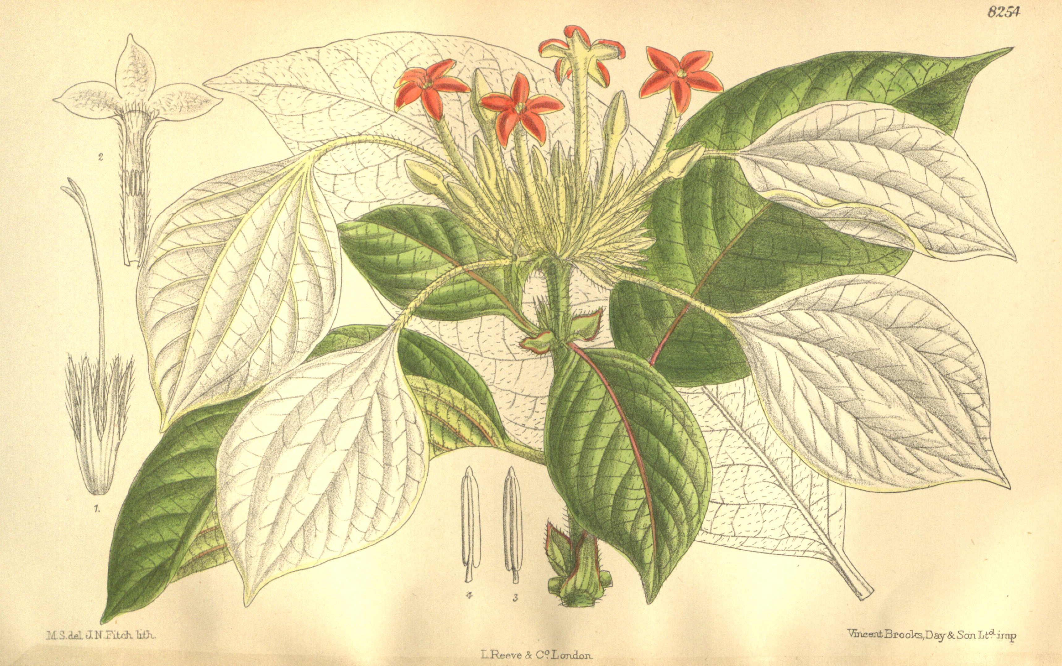 Mussaenda treutleri, Rubiaceae